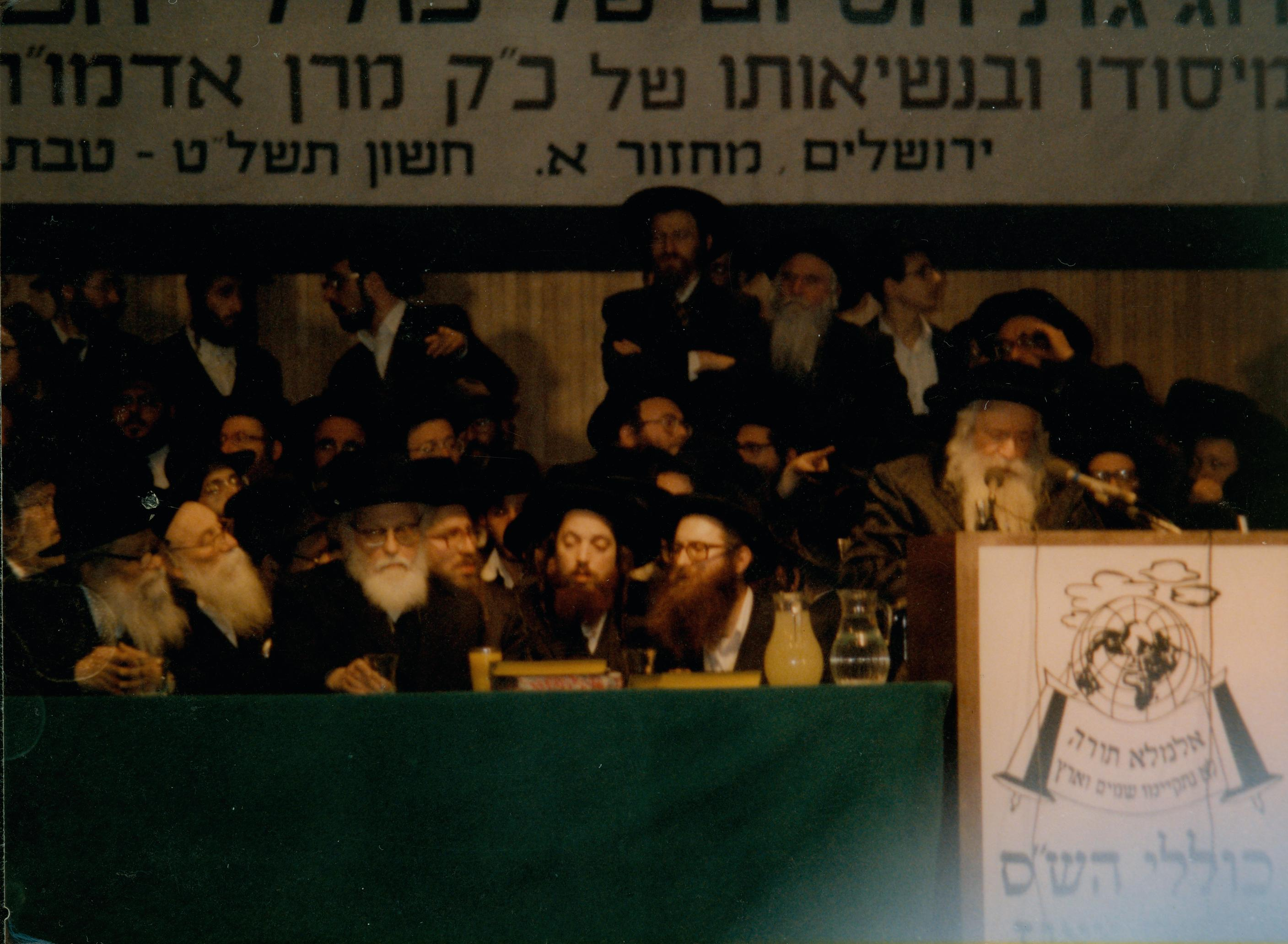 ההכרזה ההיסטורית של האדמו"ר השפע חיים מצאנז על הקמת מפעל שס, בו נבחנים מידי חודש על 70 דפי גמרא, רשי, ותוספות (נראים משמאל הבמה, הגרי"ש אלישיב ורבי מאיר חדש), טבת ה'תשמ"ג